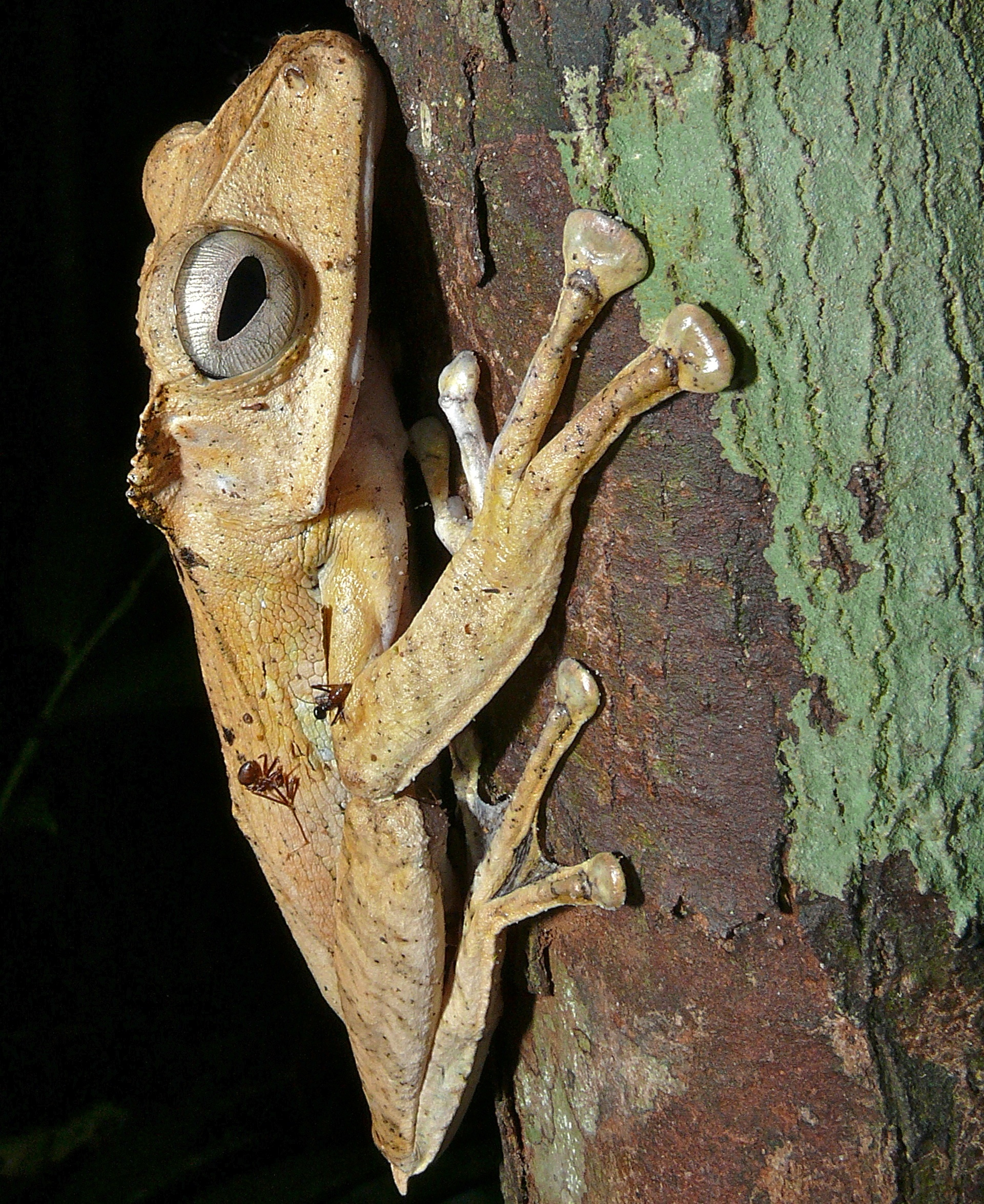 Lambir Hills NP, Sarawak, MALAYSIA